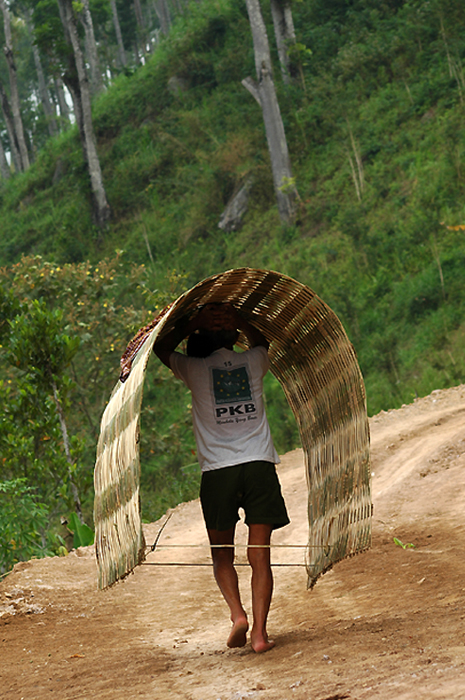 Penjual Dinding Bambu (Gedheg), di Magelang, Jawa Tengah